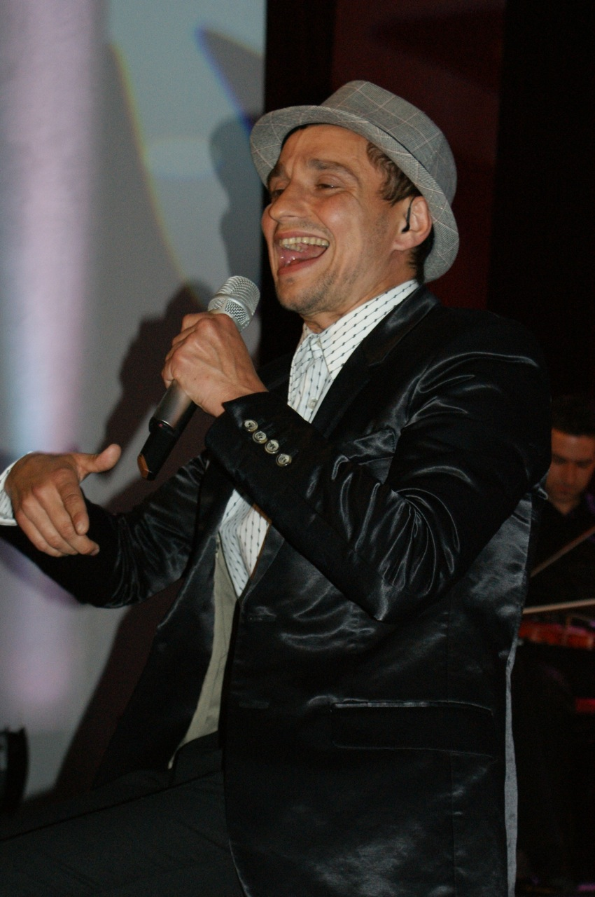 Janusz Radek - polski wokalista i aktor teatralnych inscenizacji muzycznych